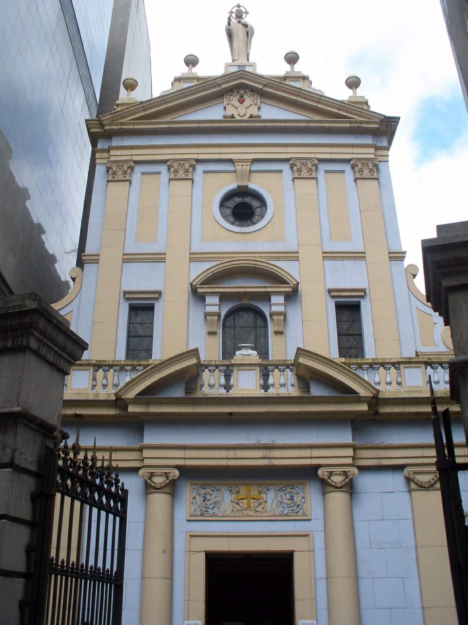 Oviedo - Iglesia de las Esclavas